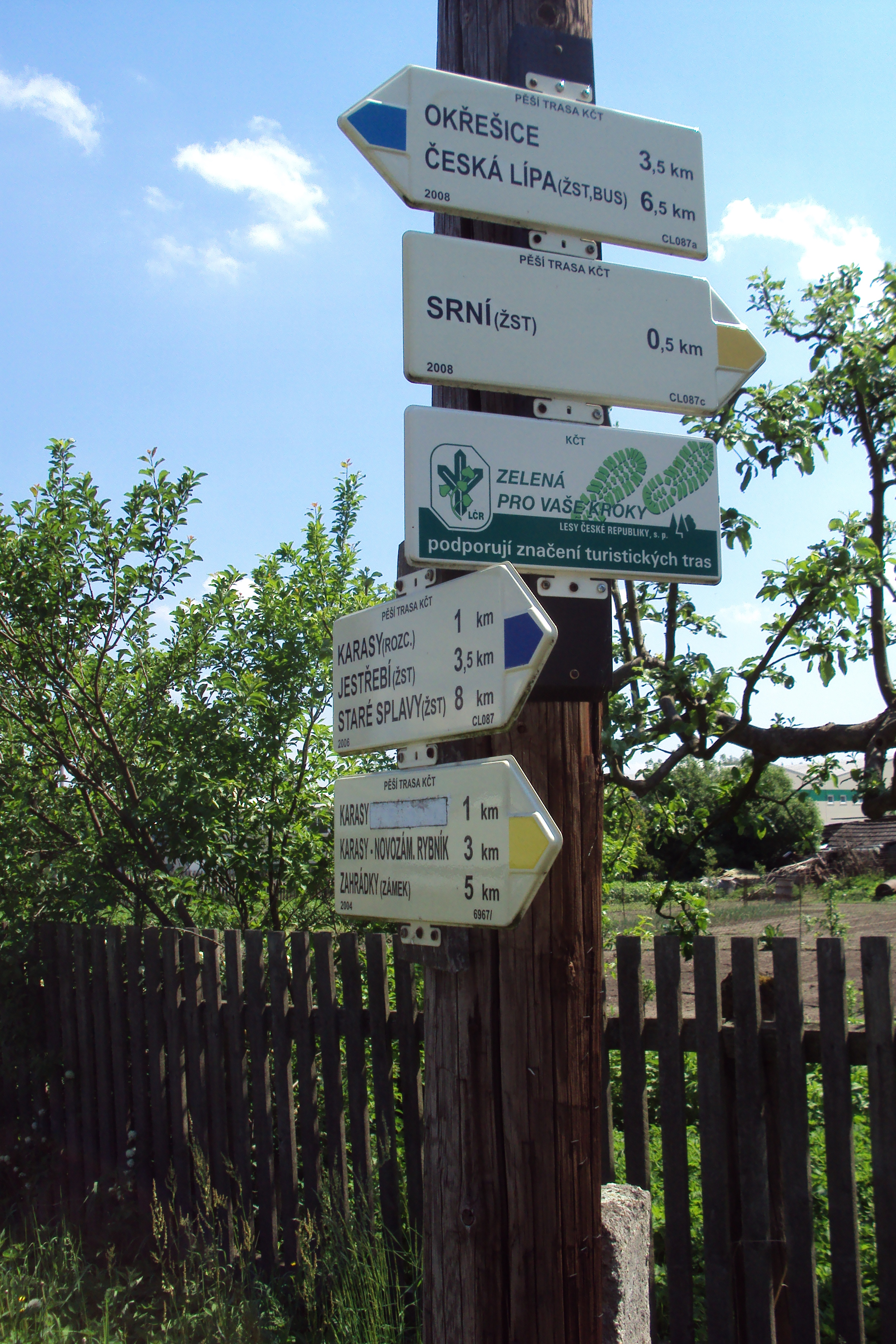 Turistický rozcestník u pily v Srní-Provodíně (modrá, žlutá)